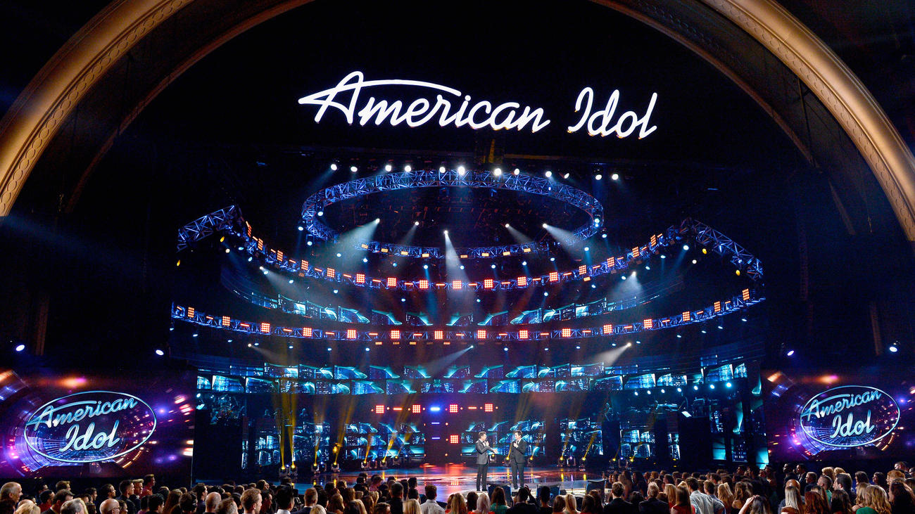 ಕನ್ನಡ: ಅವರ ಕಾರ್ಯಕ್ರಮ